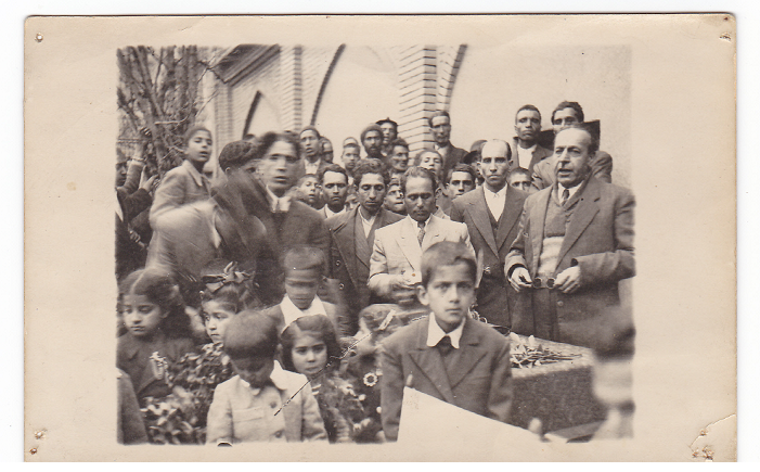 در این عکس استاد خرسندی در کنار همکارانش و چند تن از شاگردان دوره ی ابتدایی در مدرسه محل خدمتش دیده میشود